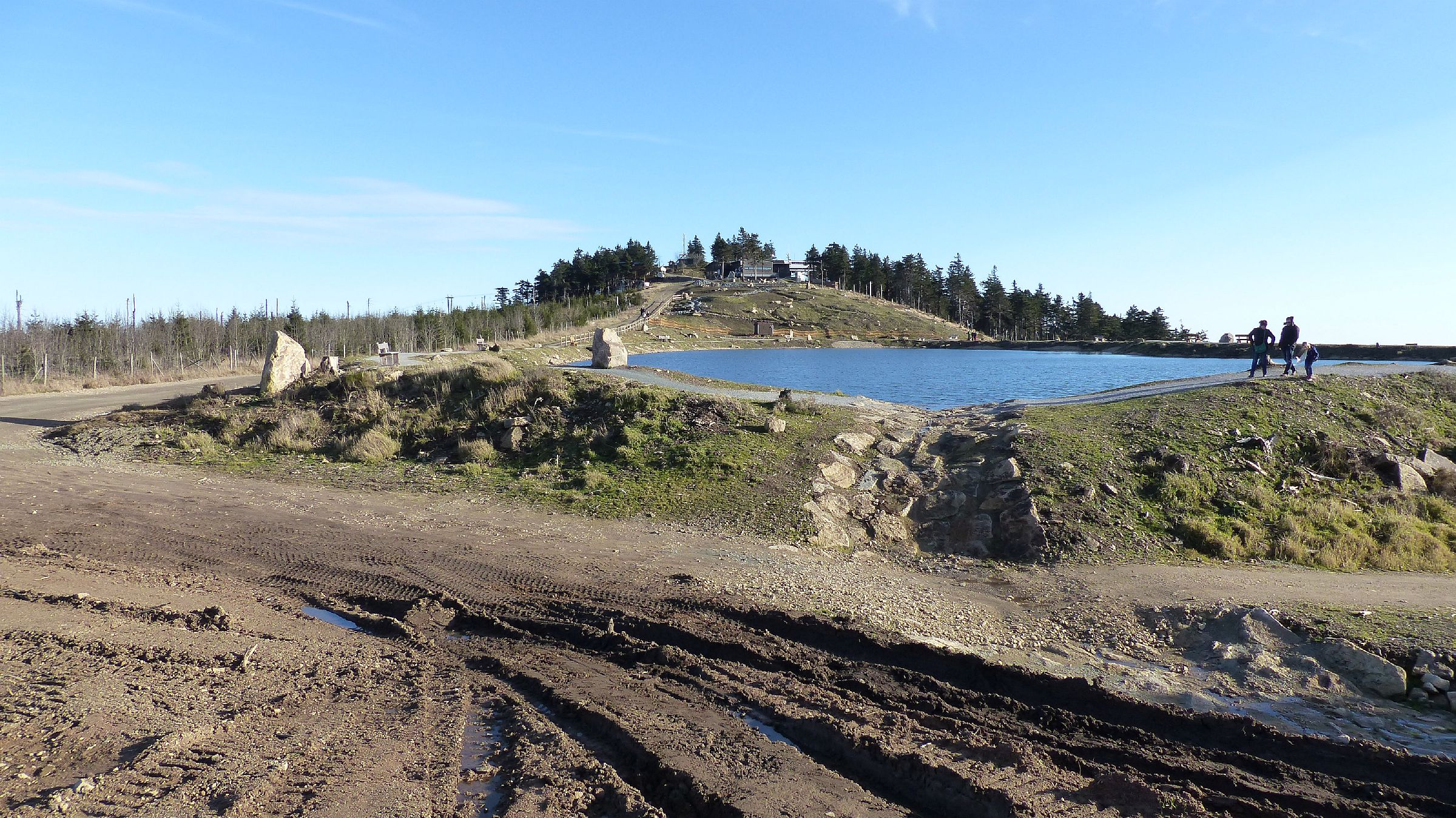 Blick von West auf den Schneisee und den Gipfel des Wurmbergs